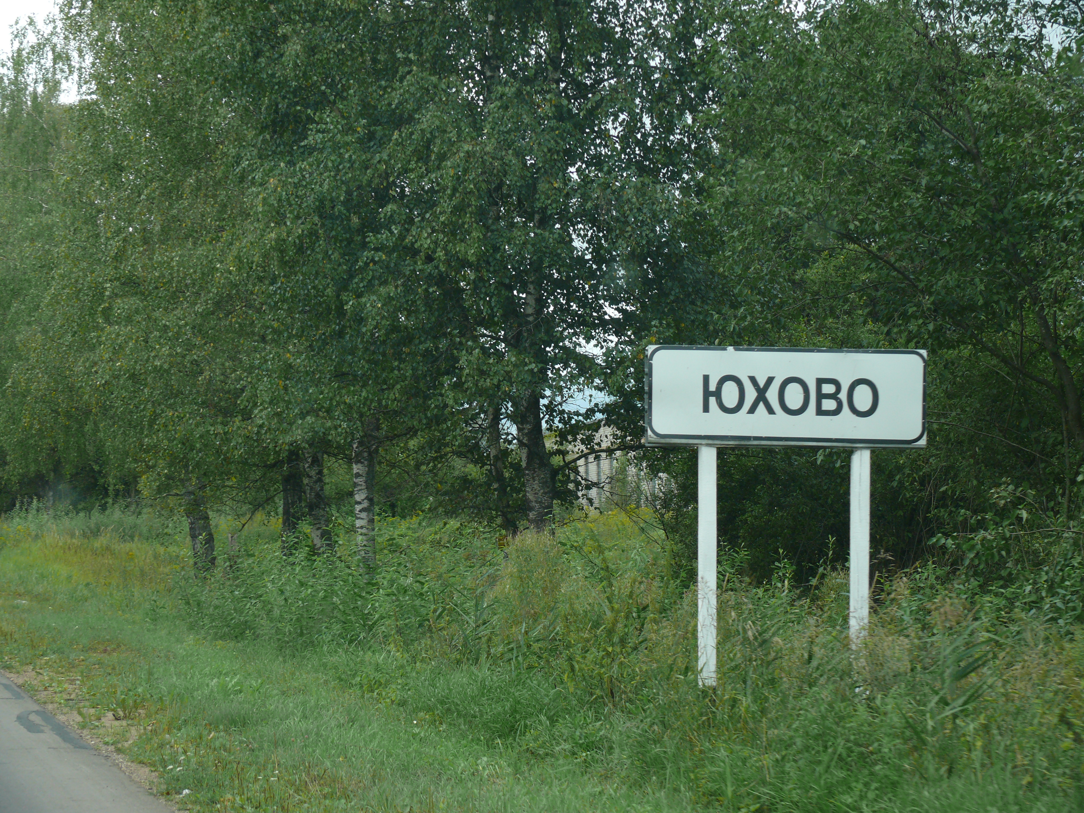 Въезд в деревню Юхново, Локнянский район псковской области